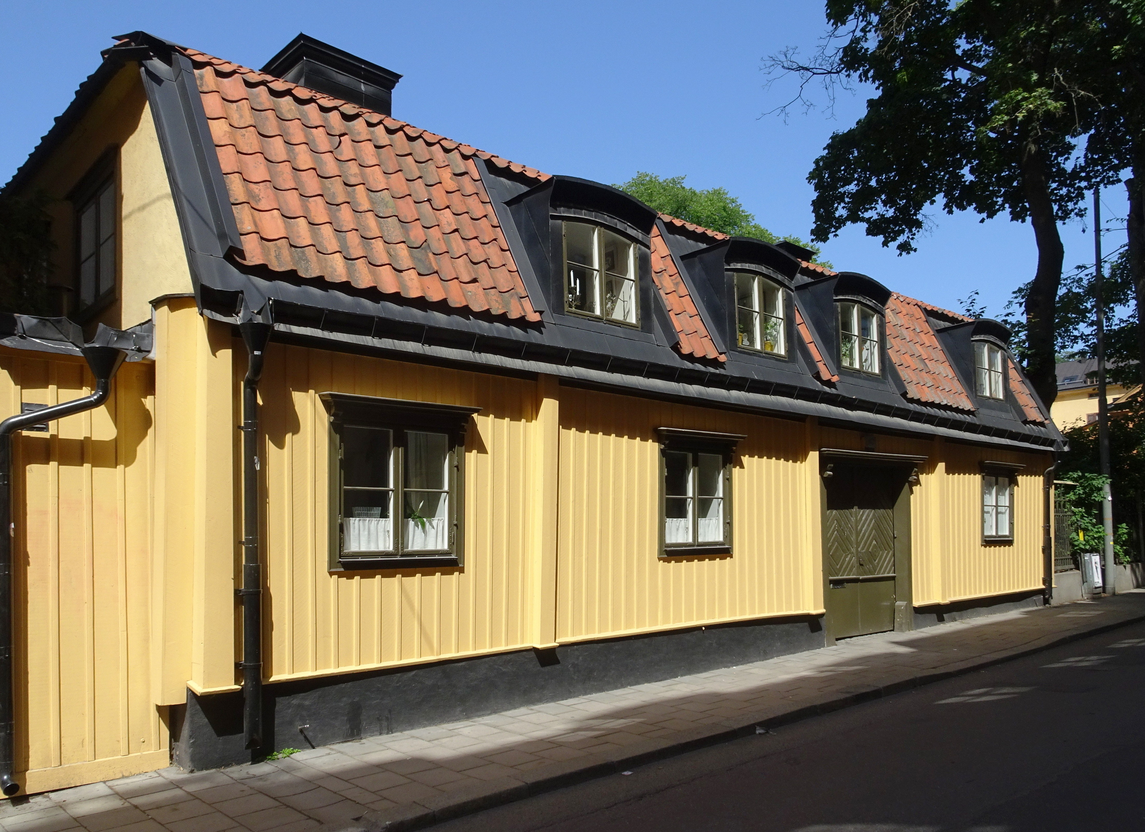 Tjärhovsgatan nr 7